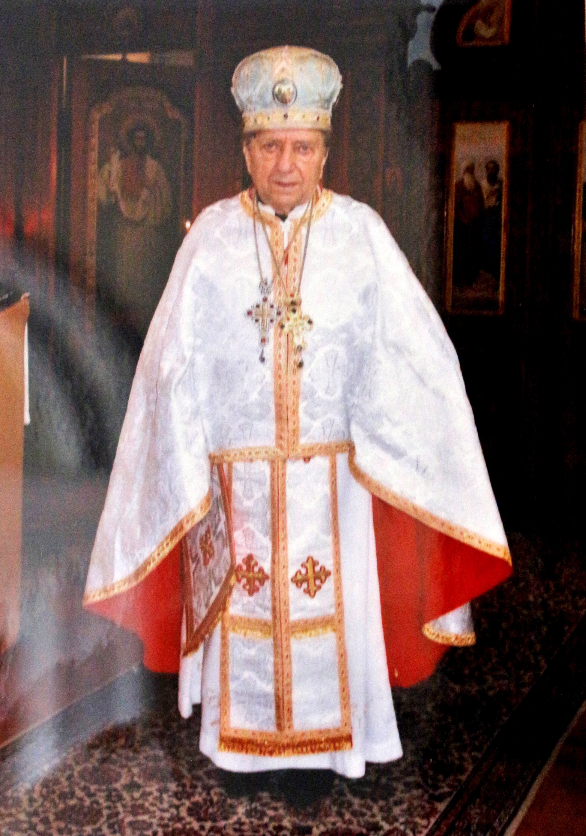 Otec ThDr. Jan Křivka